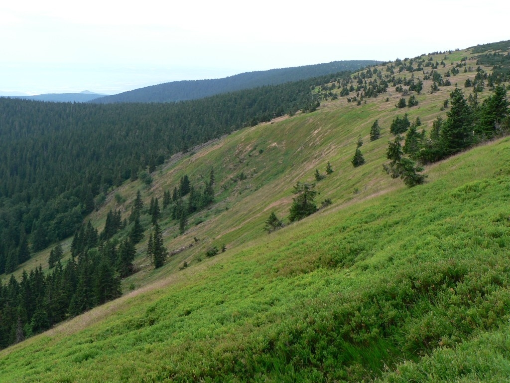 Malá kotlina, Hrubý Jeseník